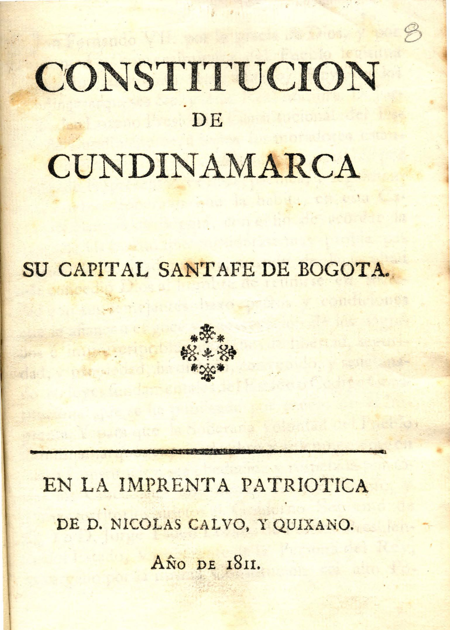 Palacio del Poder Ejecutivo de Santafé (Junta Suprema)